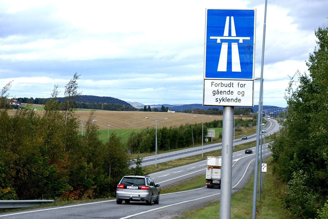 Påkjøringsrampe ved avkjørselen til Sande nord i Vestfold fylke rett syd for Drammen sentrum.